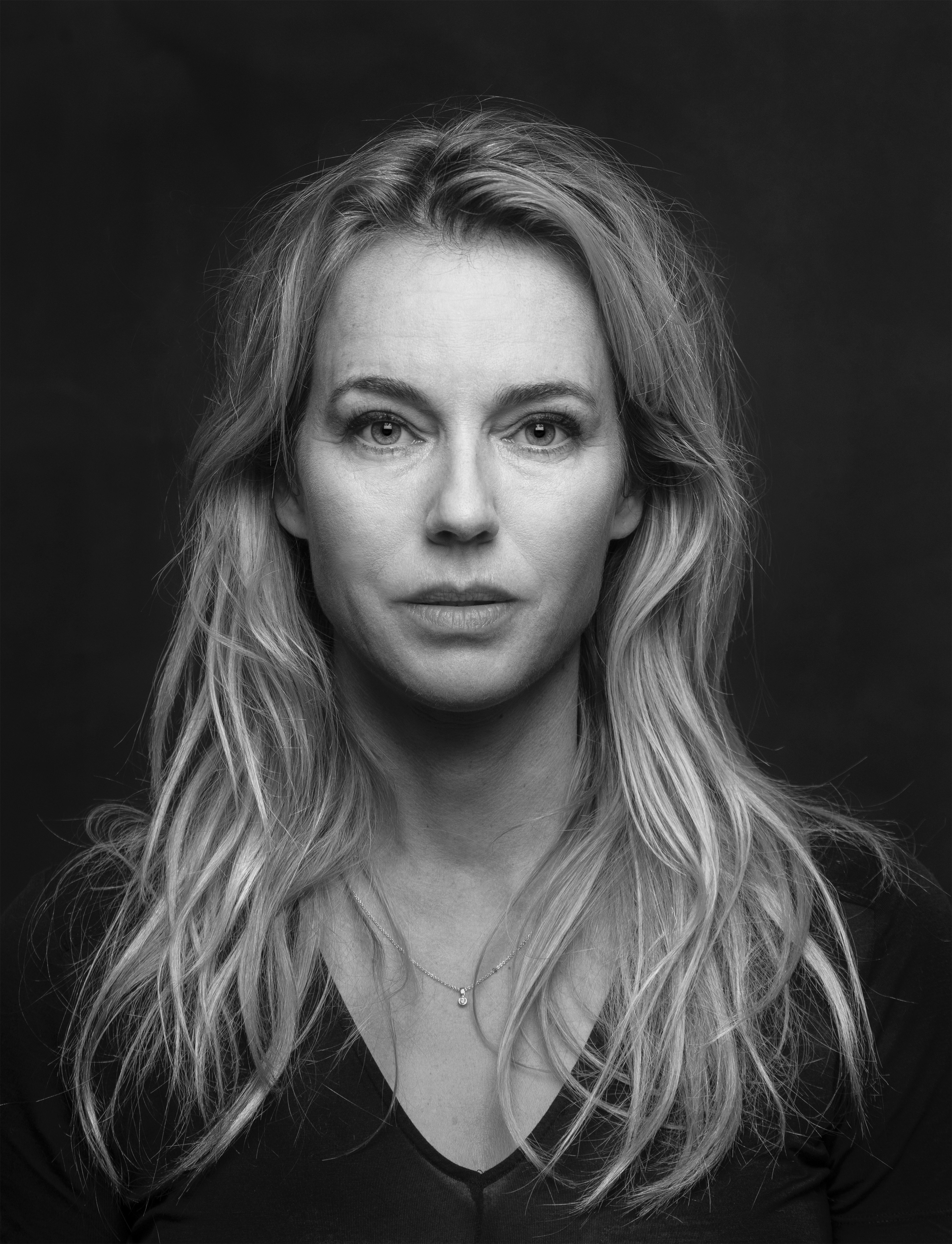 Marion Pauw, Nederlands schrijfster. © JW Kaldenbach